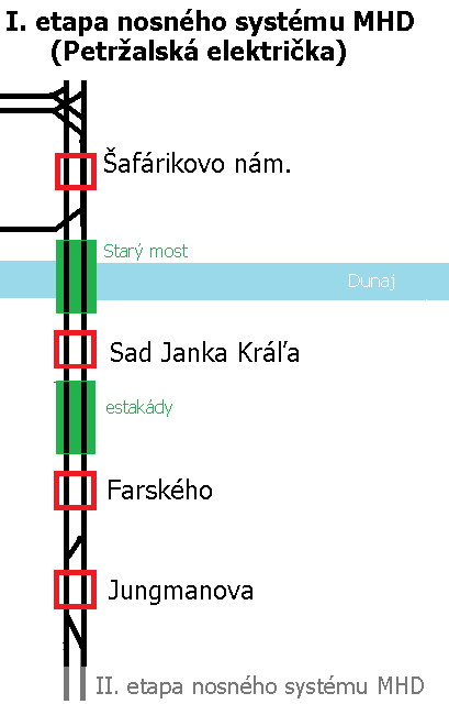 Schéma I. etapy nosného systému MHD v Bratislave.